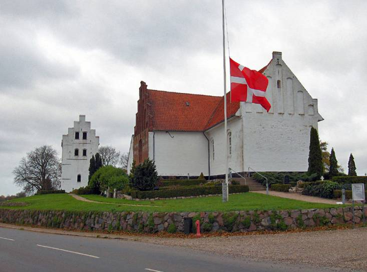 fra øst